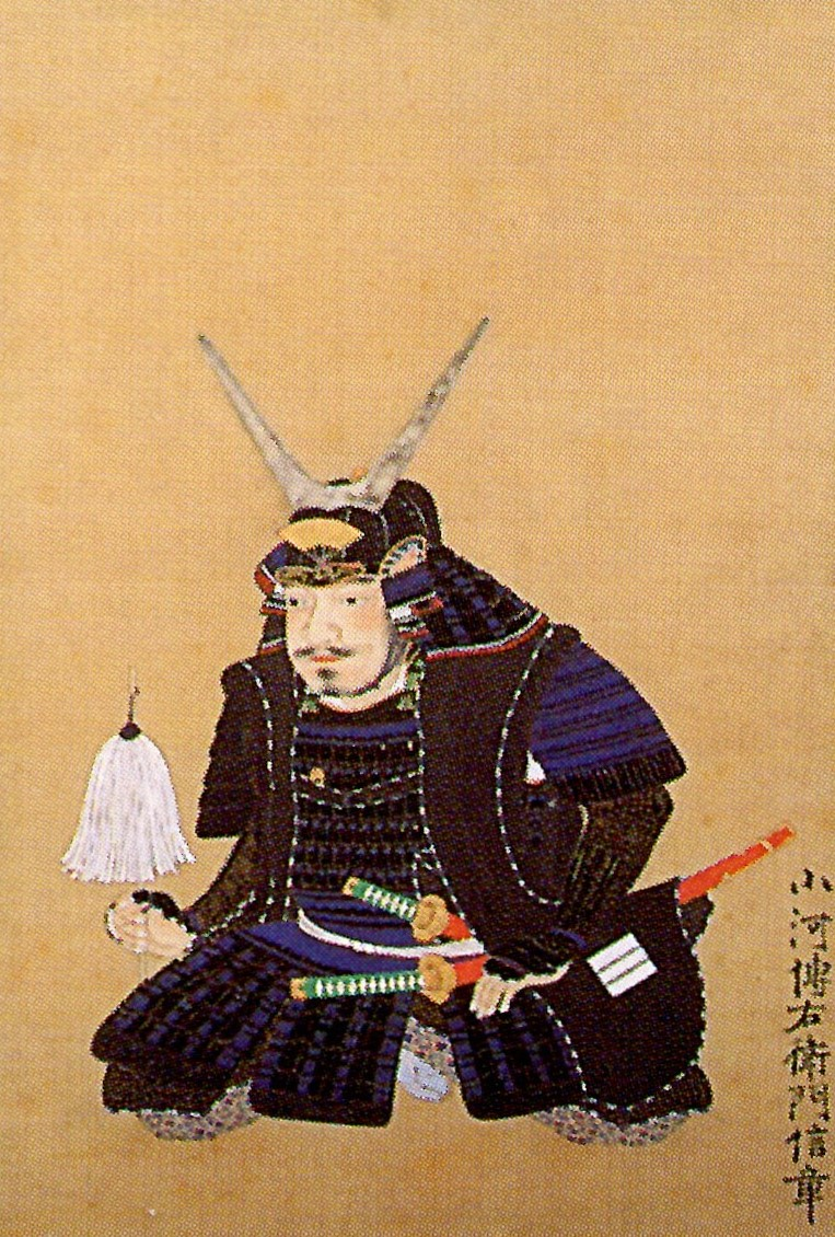 小河信章の肖像。